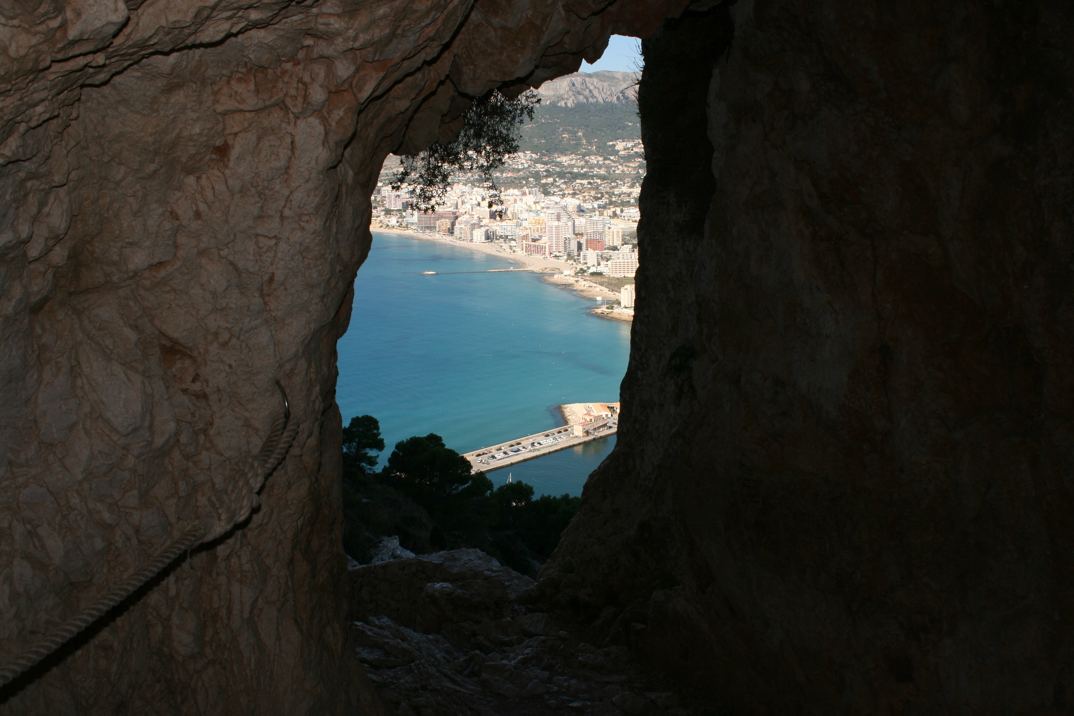 Playa de Calpe desde el túnel por el que se asciende al Peñón de Ifac